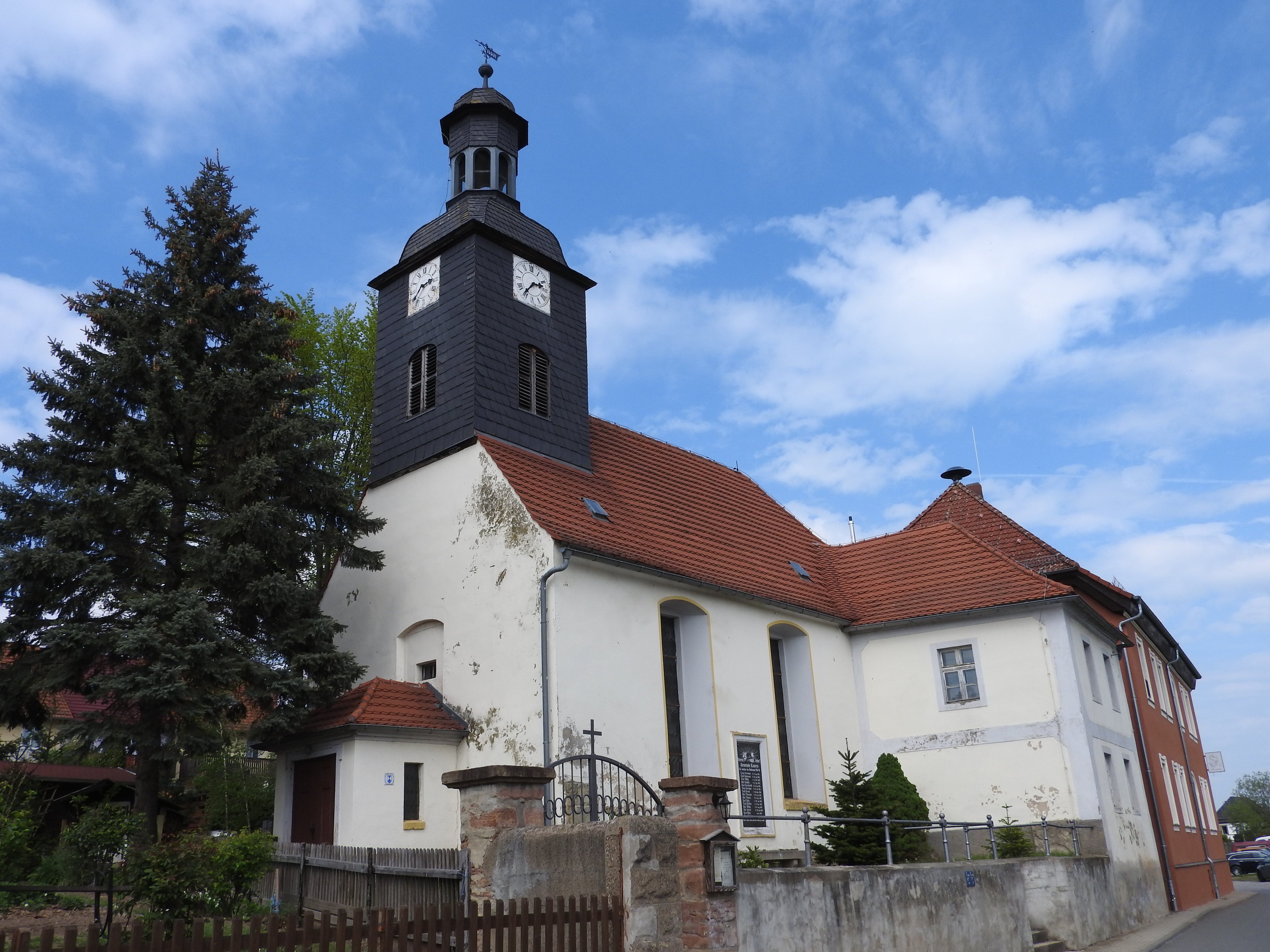 Kirche in Kauern, Thüringen